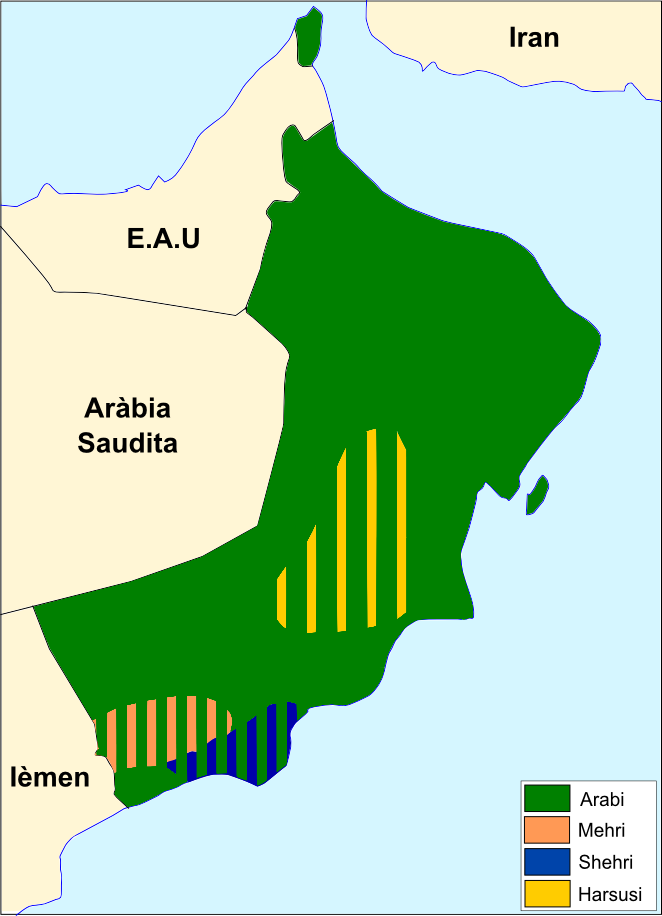 Lengas dau Sultanat d'Oman a l'acomençament dau sègle XXI.